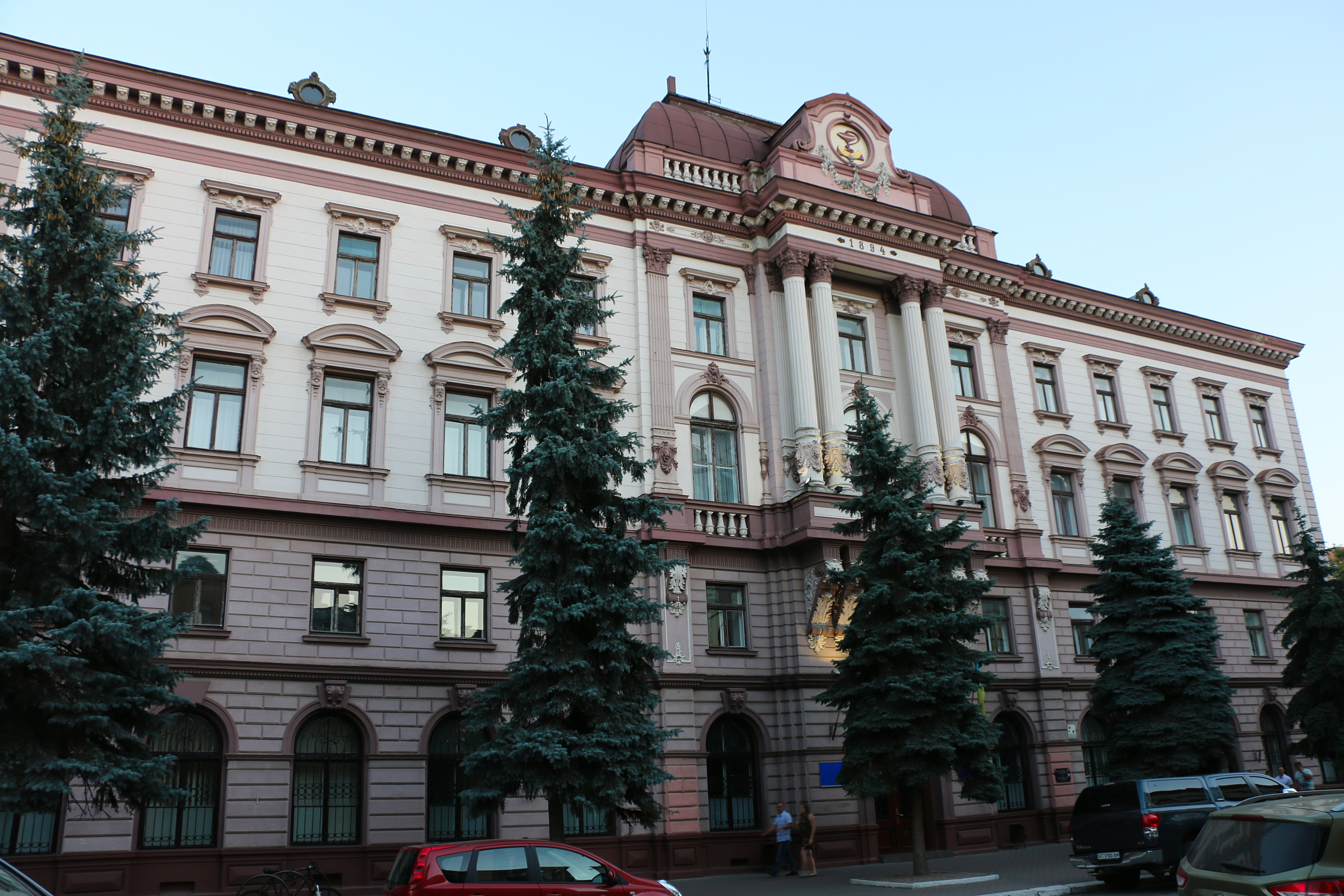 Австрійська дирекція залізниці, пізніше польський магістрат (мур.), Івано-Франківськ, вул. Галицька, 2